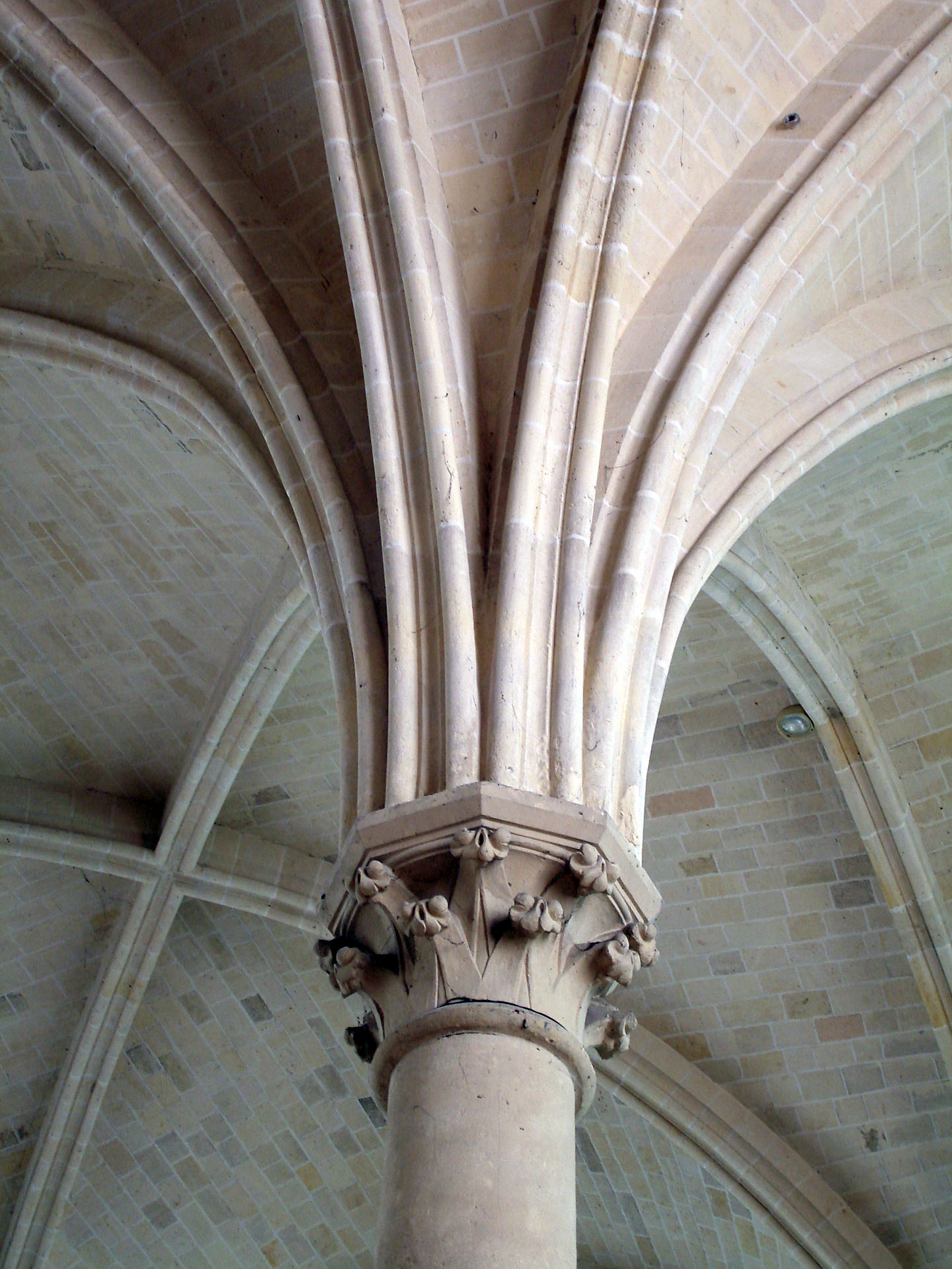 Les voûtes du réfectoire des moines de l'abbaye de Royaumont, Val-d'Oise, France.